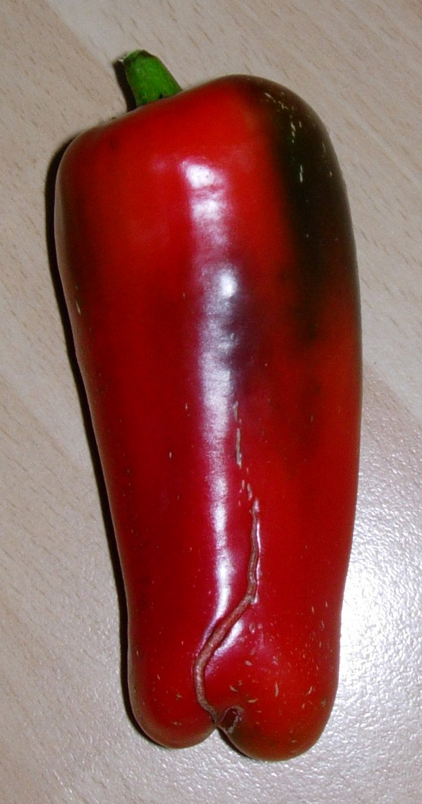 Capsicum annuum ripe fruit